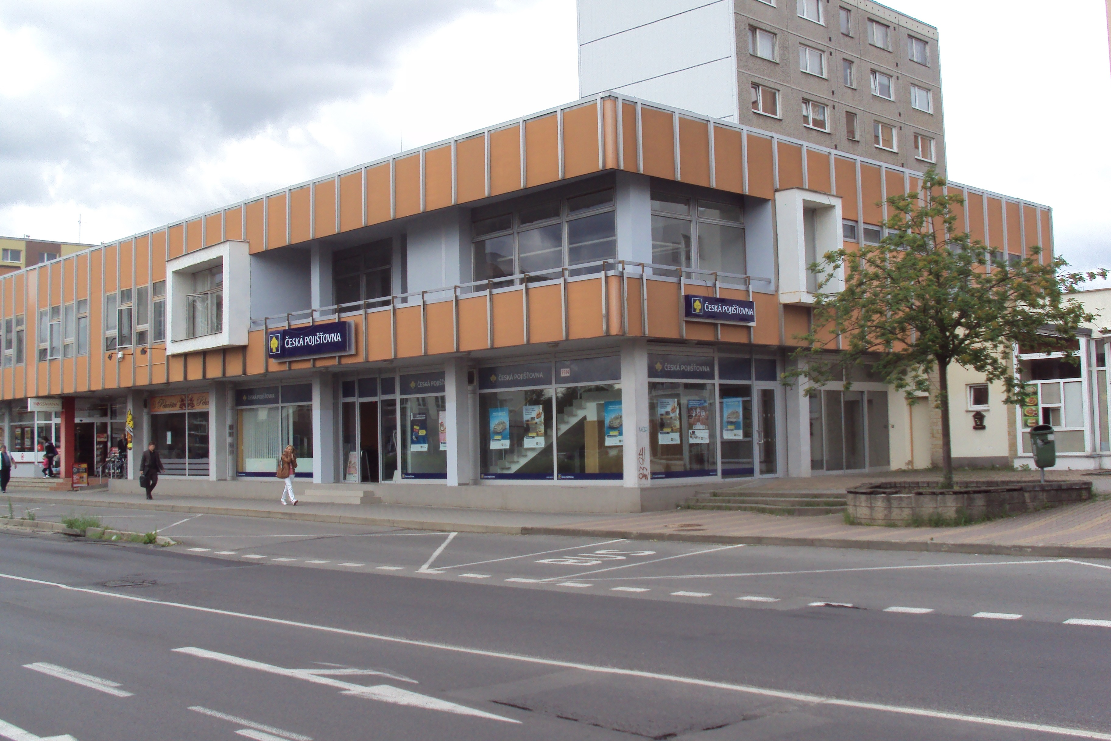 Union banku zde vystřídala nově pobočka České pojišťovny